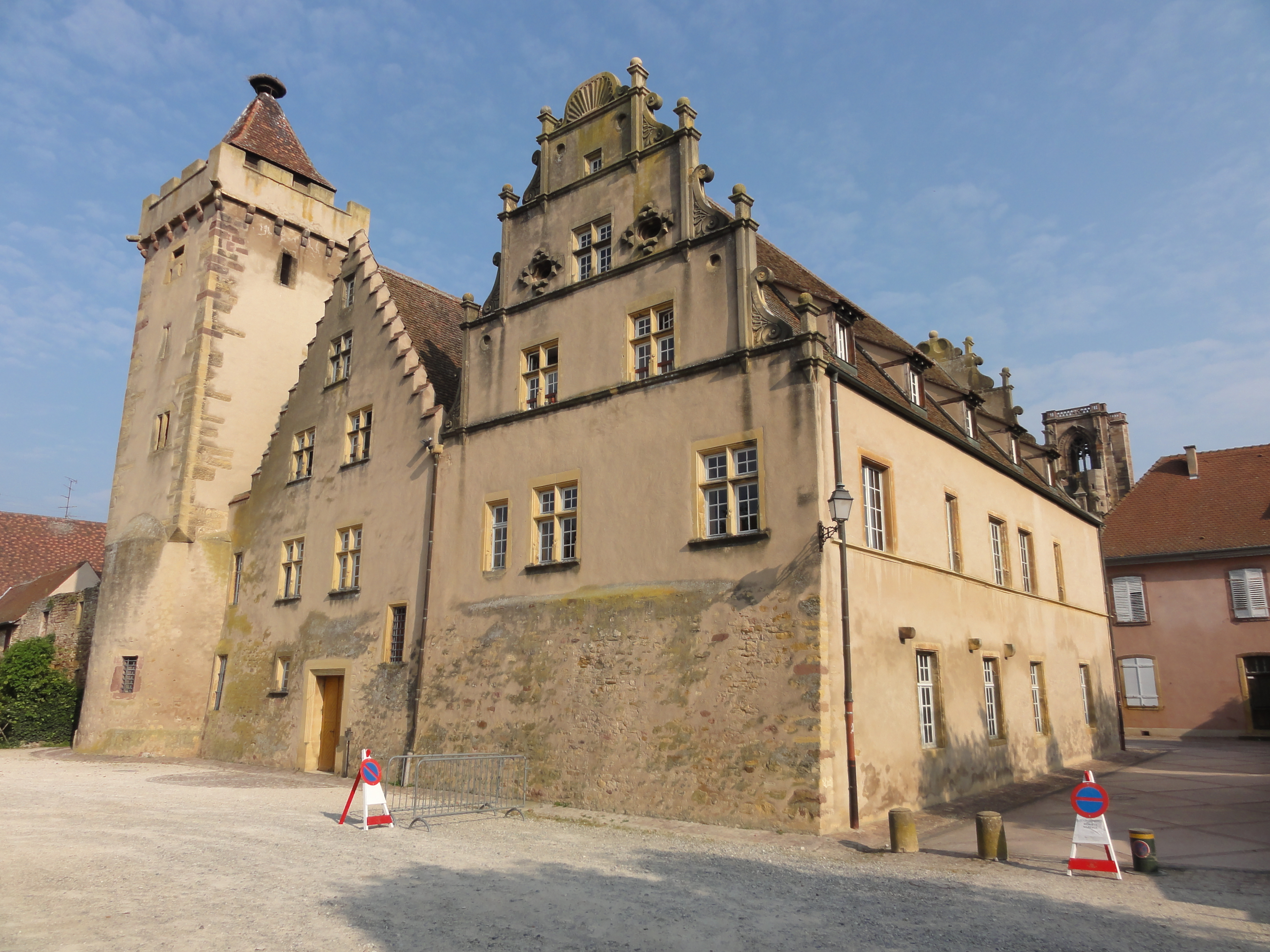 Alsace, Haut-Rhin, Rouffach, Tour des Sorcières (XIVe), place de la République. It is indexed in the Base Mérimée, a database of architectural heritage maintained by the French Ministry of Culture, under the references PA00085660, PA00085639 and IA68004441. Ancien hôtel de ville (XVe-XVIe-XVIIIe), 8 place de la République: It is indexed in the Base Mérimée, a database of architectural heritage maintained by the French Ministry of Culture, under the references PA00085642 and IA68004437.